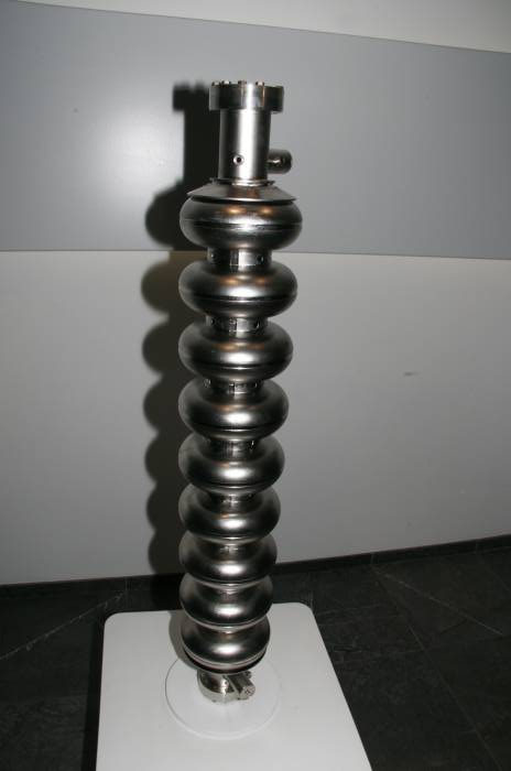 DESY, Hamburg; Supraleitende Kavität zur Beschleunigung von Elektronen und Positronen; Länge der Struktur ca. 1m; Hergestellt aus hochreinem Niob. Im Inneren der Kavität beschleunigen die elektrischen Felder von stehenden elektromagnetischen Wellen die geladenen Teilchen. Der Resonator wurde aus hochreinem Niob gebaut und ist für eine Resonanzfrequenz von 1,3 GHz ausgelegt. Der Resonator besteht aus neun elliptisch geformten Zellen (Rotationsellipsoiden). Die Länge einer einzelnen Zelle ist so gewählt, dass sich das elektrische Feld der Welle gerade umkehrt, wenn ein Teilchen in die nächste Zelle eintritt. Damit wird eine kontinuierliche Beschleunigung gewährleistet. Bei typischen Betriebstemperaturen um 2K ist die Niob-Kavität supraleitend und benötigt weniger Energie zum Betrieb als herkömmliche Kavitäten aus Kupfer. Sonstiges: Veröffentlichung mit freundlicher Genehmigung DESY, Hamburg